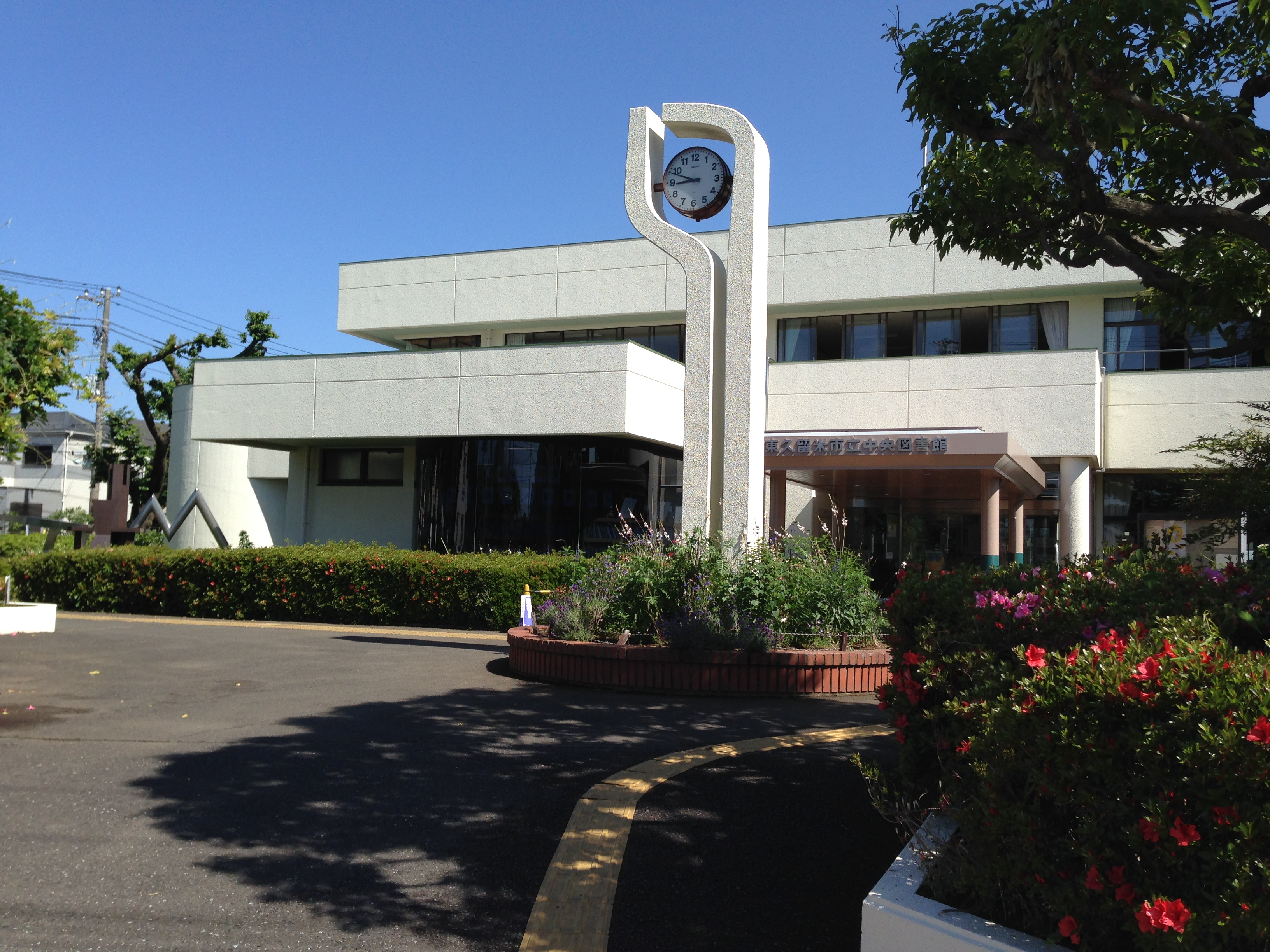 東京都東久留米市・東久留米市立中央図書館（東久留米市立図書館）